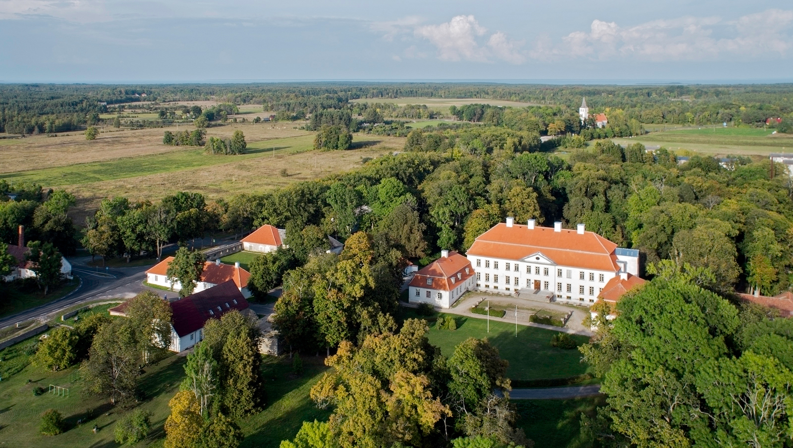 Suuremõisa lossi peahoone. Vaade ülevalt